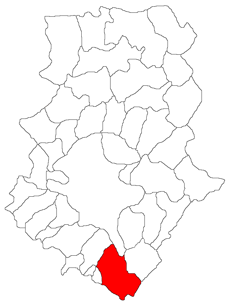 Volapük: Topam in ziläk: Ilfov.